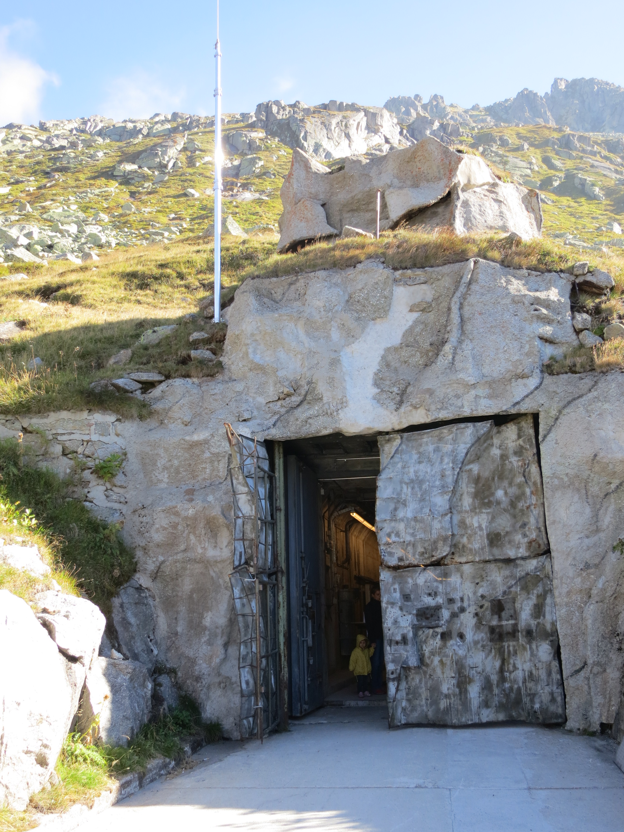 Festung Sasso da Pigna, Airolo, Schweiz